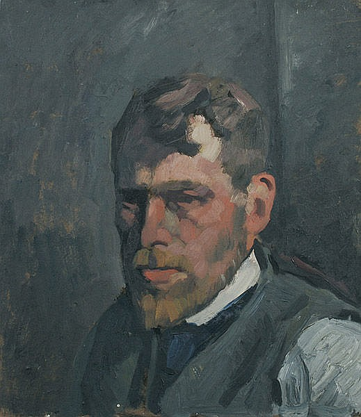 Karl Dillingers Selbstbildnis mit gesenktem Blick